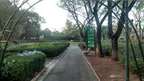 תמונות מגן המגנים